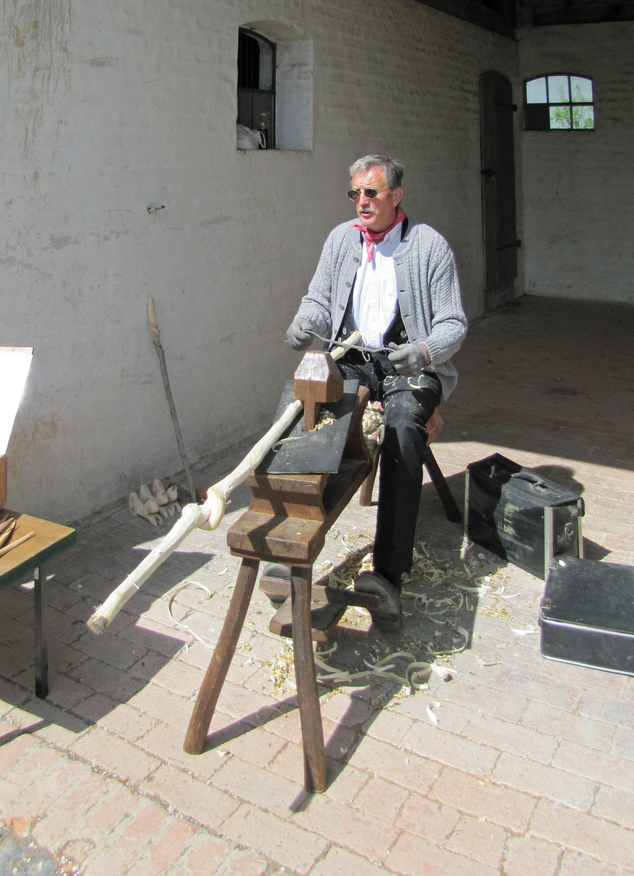 Stockmacher bei der Arbeit. Im Hessenpark bei Neu Anspach im Taunus.